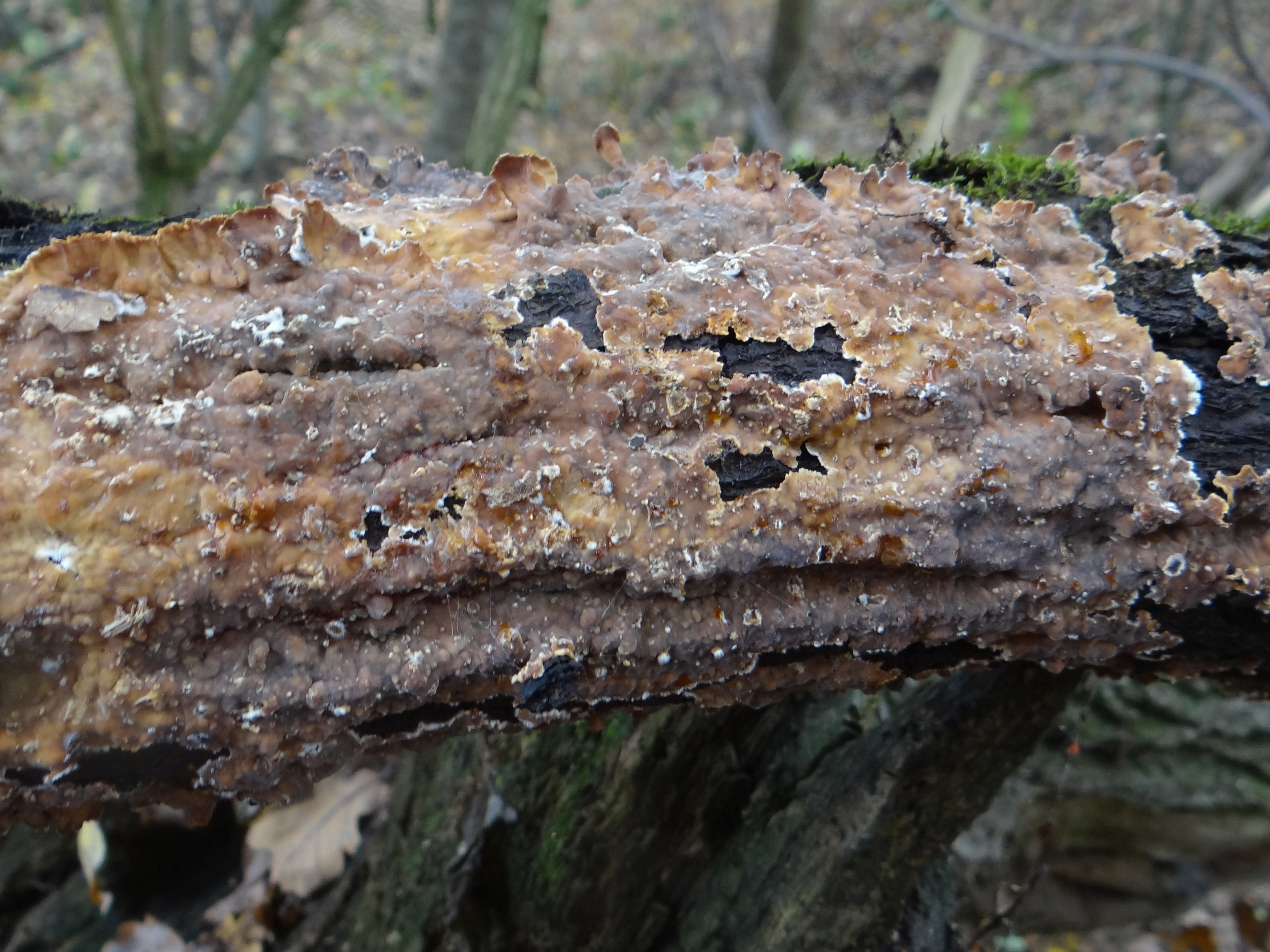 Stereum gausapatum on Quercus. Location: Poland, Puszcza Niepołomicka, rezerwat przyrody Dębina